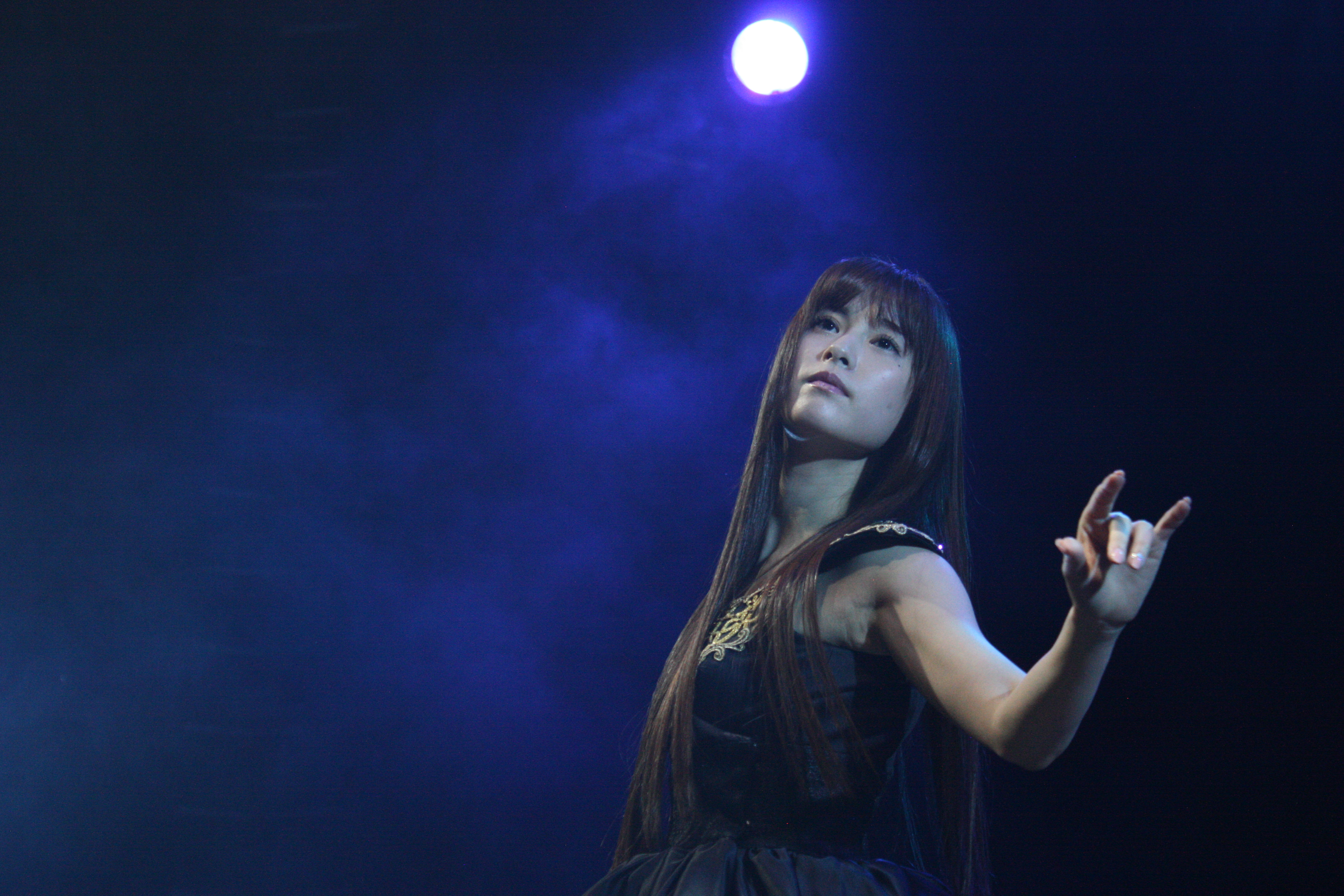 El grupo japonés Kalafina integrado por Hikaru, Keiko y Wakana, presentándose en el Plaza Condesa de la Ciudad de México el pasado 20 de Febrero.